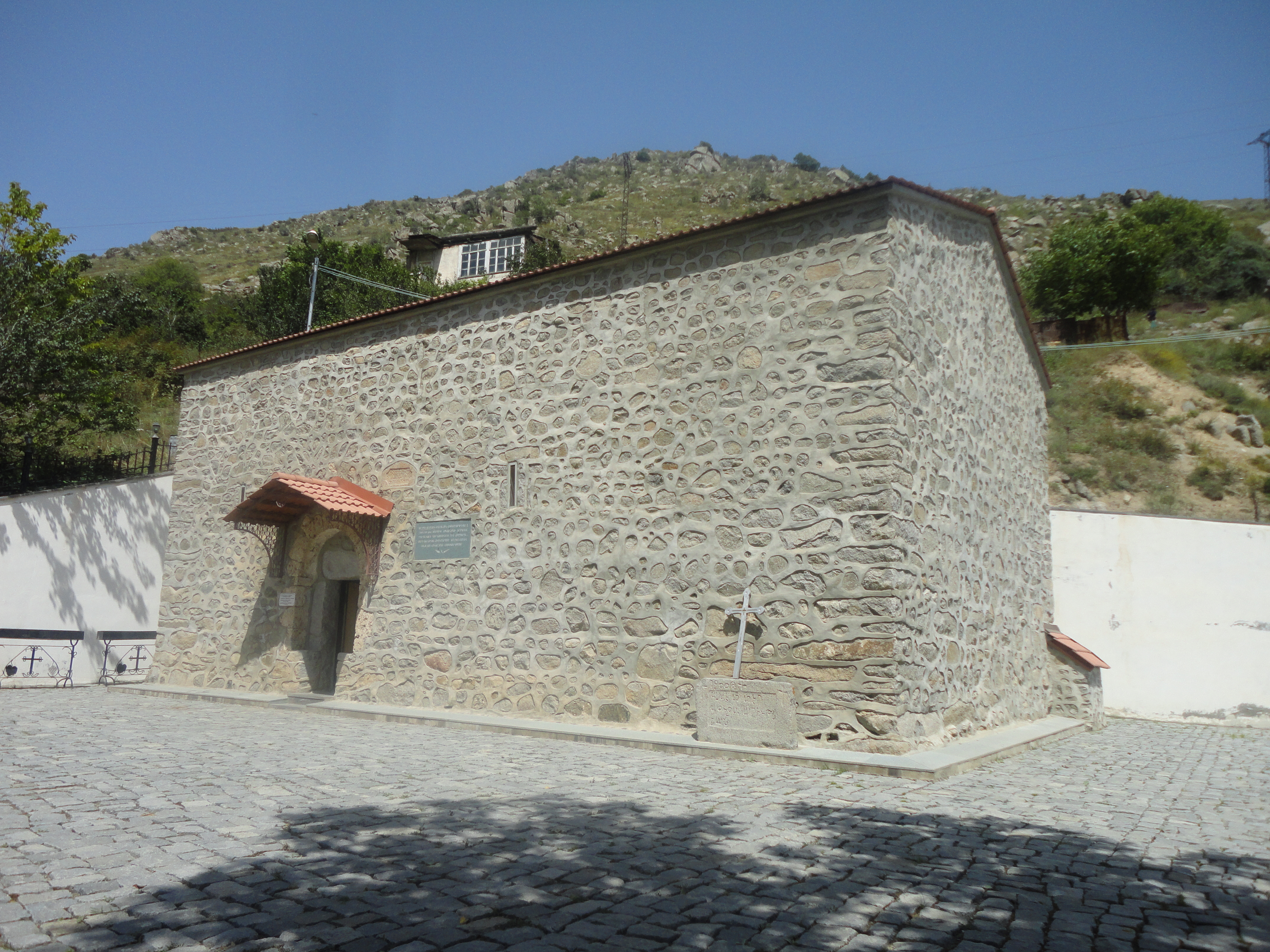 Surb Astvatsatsin Church, Kajaran